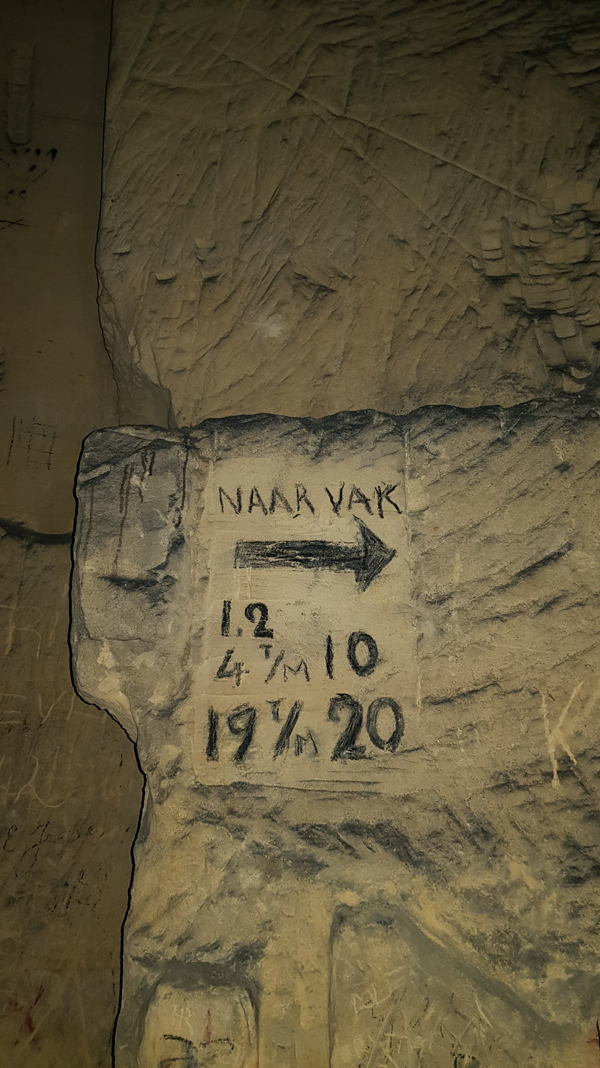 Gangenstelsel Zonneberg in de Sint-Pietersberg, Maastricht, Nederland